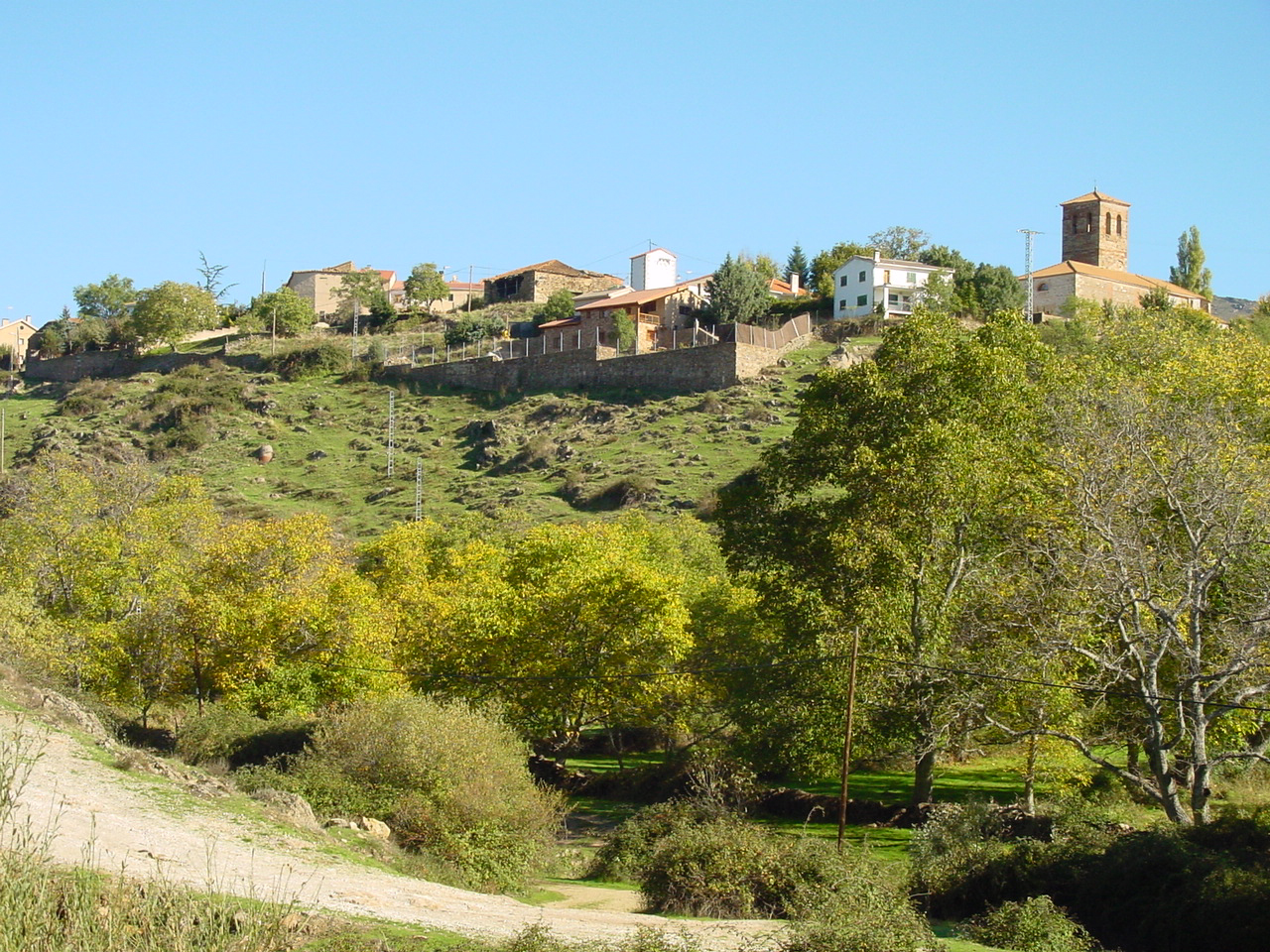 Vista de Horcajo de la Sierra.